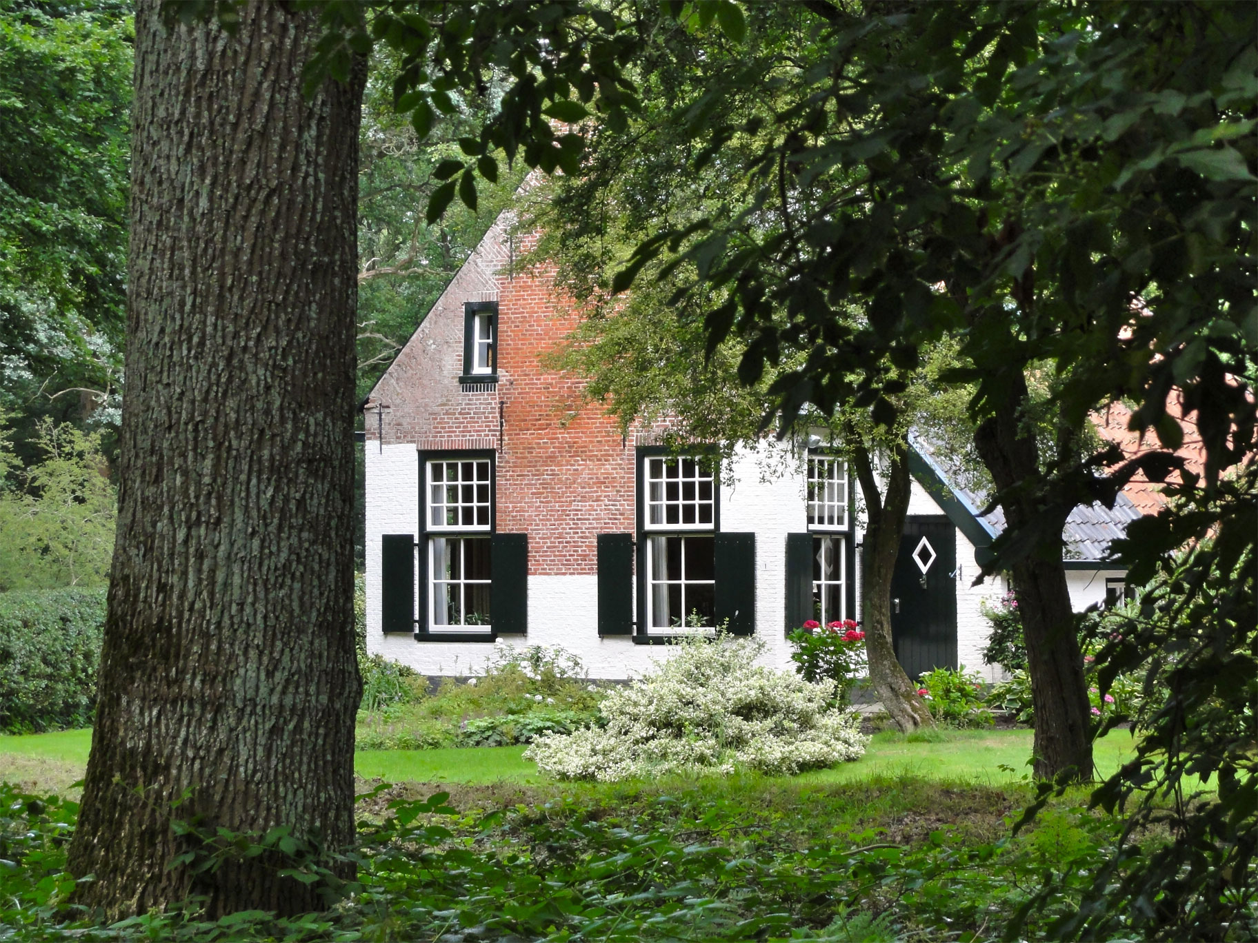 Kerkepad West 1 Beetsterzwaag